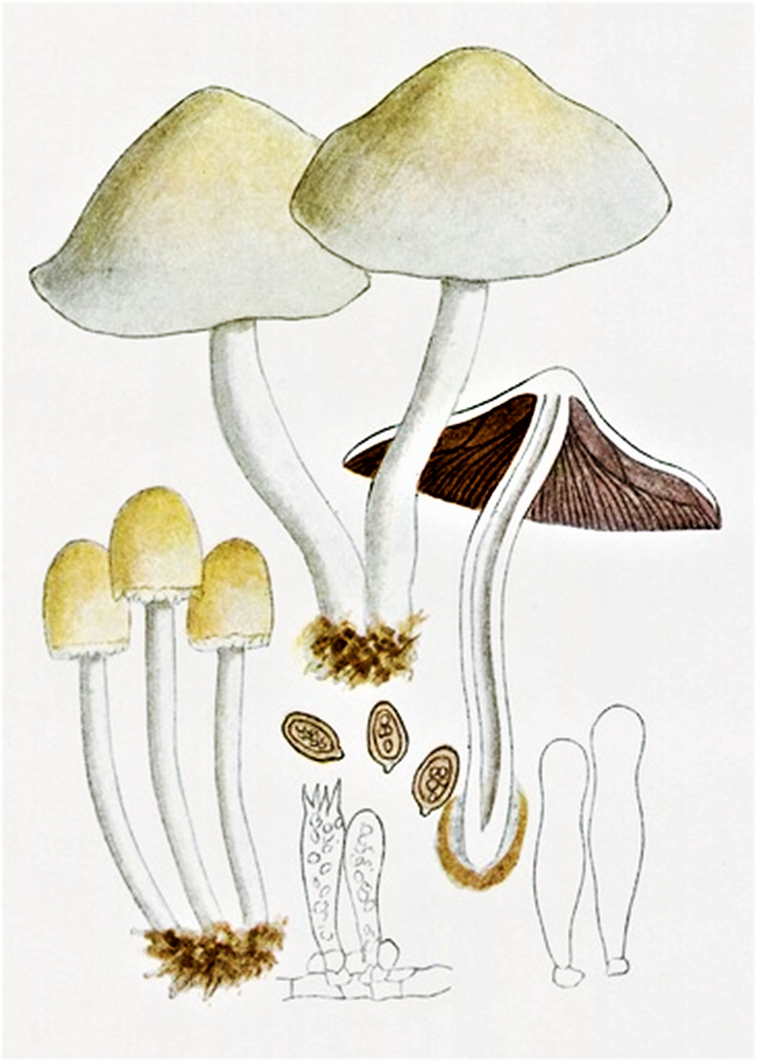 Giacomo Bresadola: Hypholoma candolleanum (Fr., 1818) Quél. (1872), heute Psathyrella candolleana (Fr.) Maire (1937)